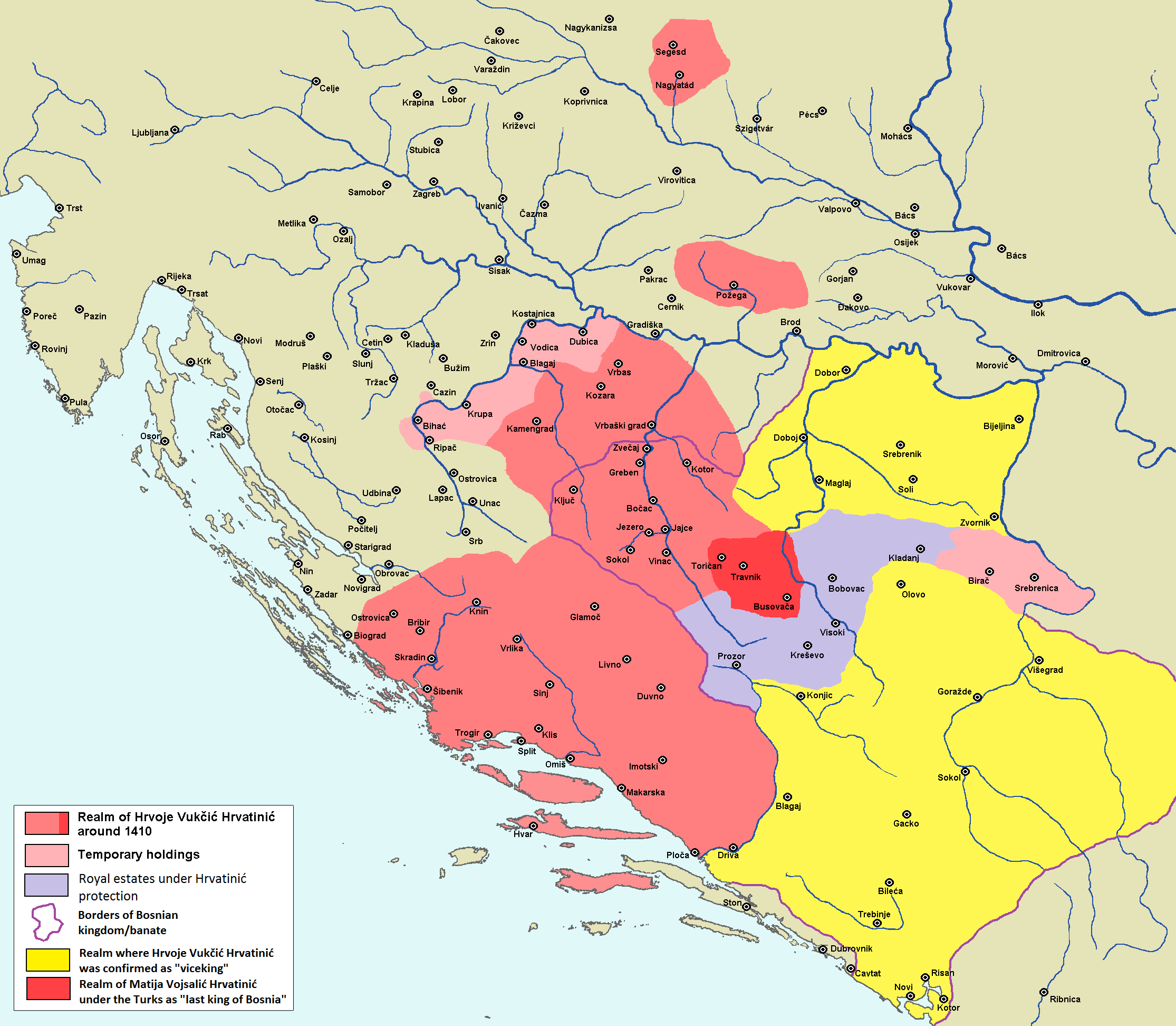 Prostori pod kontrolom Hrvatinića i ostatak Bosne.